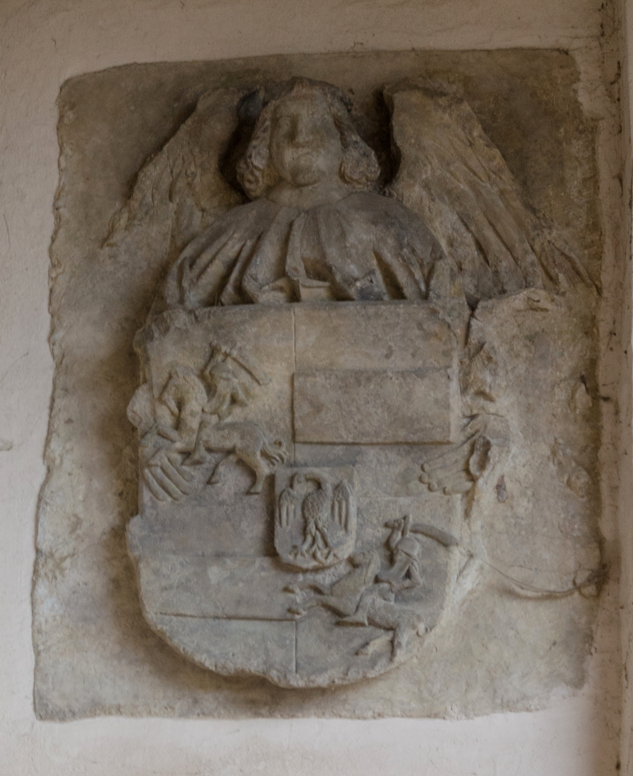 Bautzen, Matthiasturm